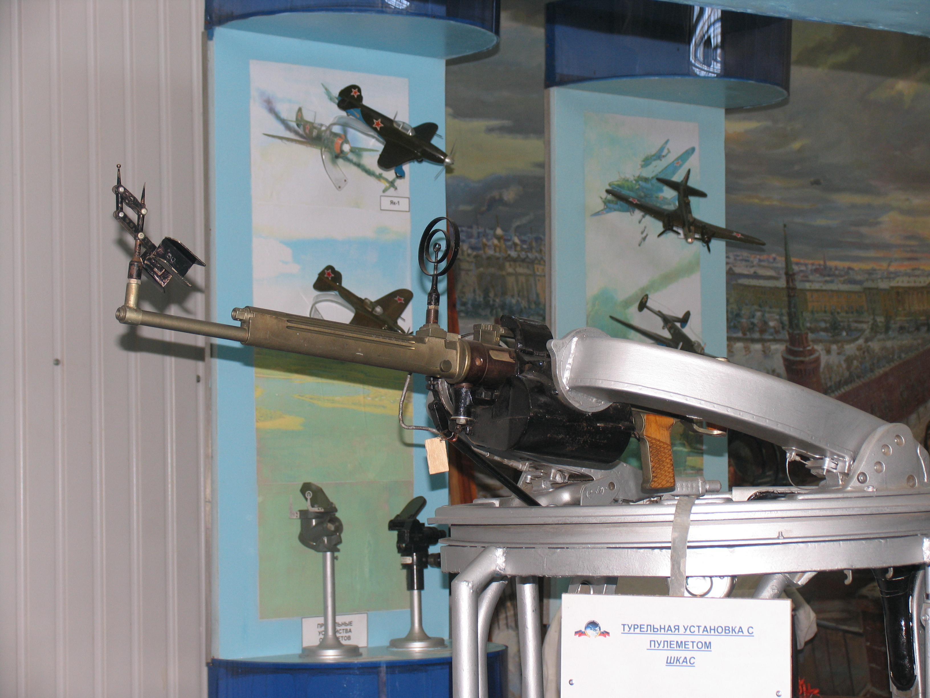 Авиационный пулемёт ШКАС на турели. Музей ВВС.